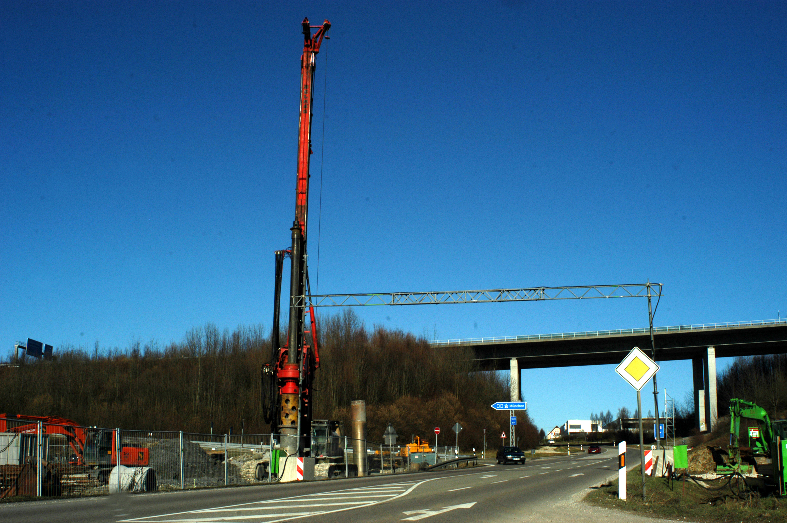 Neubaustrecke Wendlingen-Ulm: Arbeiten an einer Brücke über die Landesstraße 1214 zwischen Weilheim an der Teck und Aichelberg